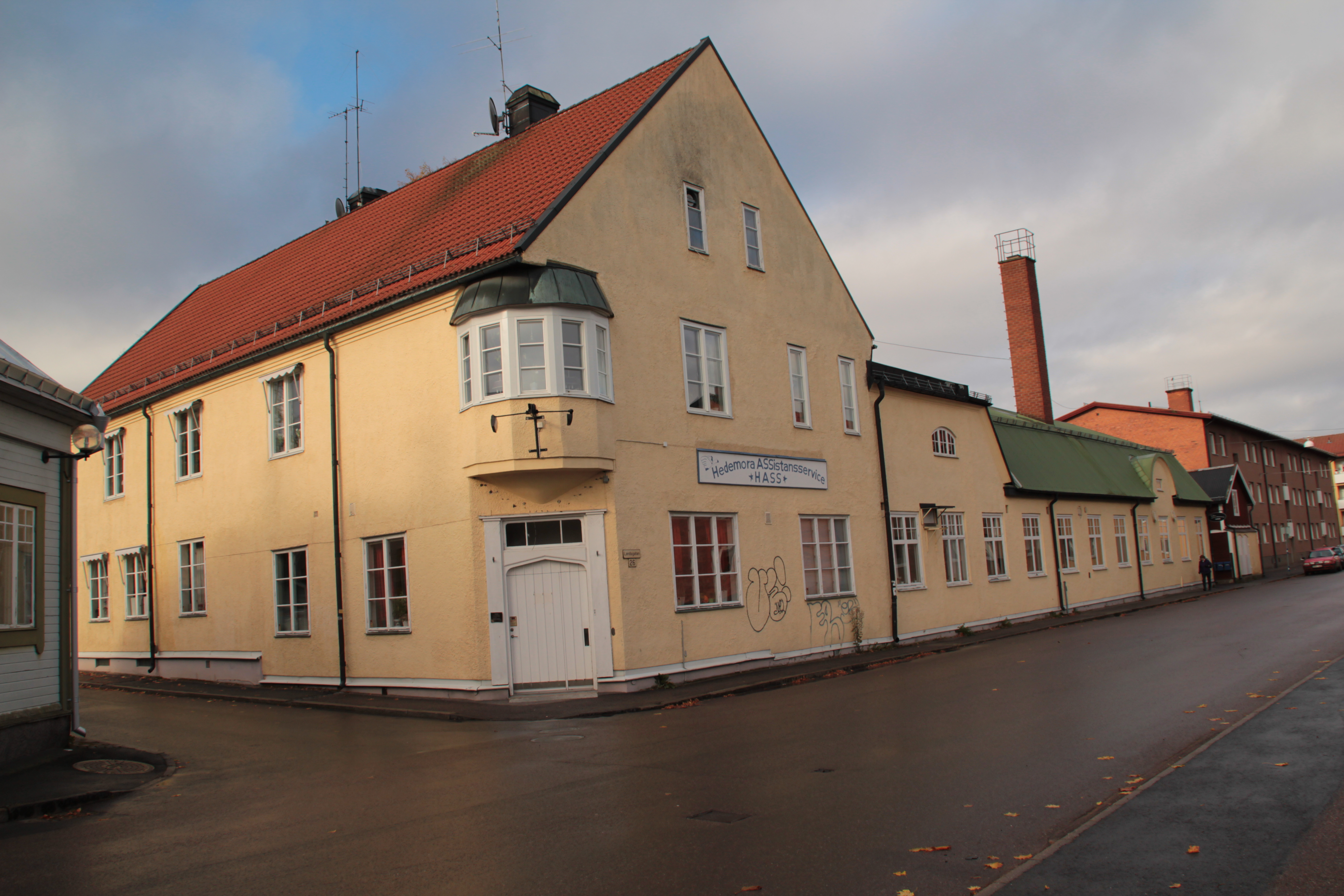 Tidningshuset, Södra Dalarnes Tidnings gamla lokaler med redaktion och tryckeri, Hedemora, Sverige. Numera (2012) håller Hedemora Assistansservice (HASS) till i lokalerna och SDT har sin redaktion på Åsgatan (och tryckeri i Falun)